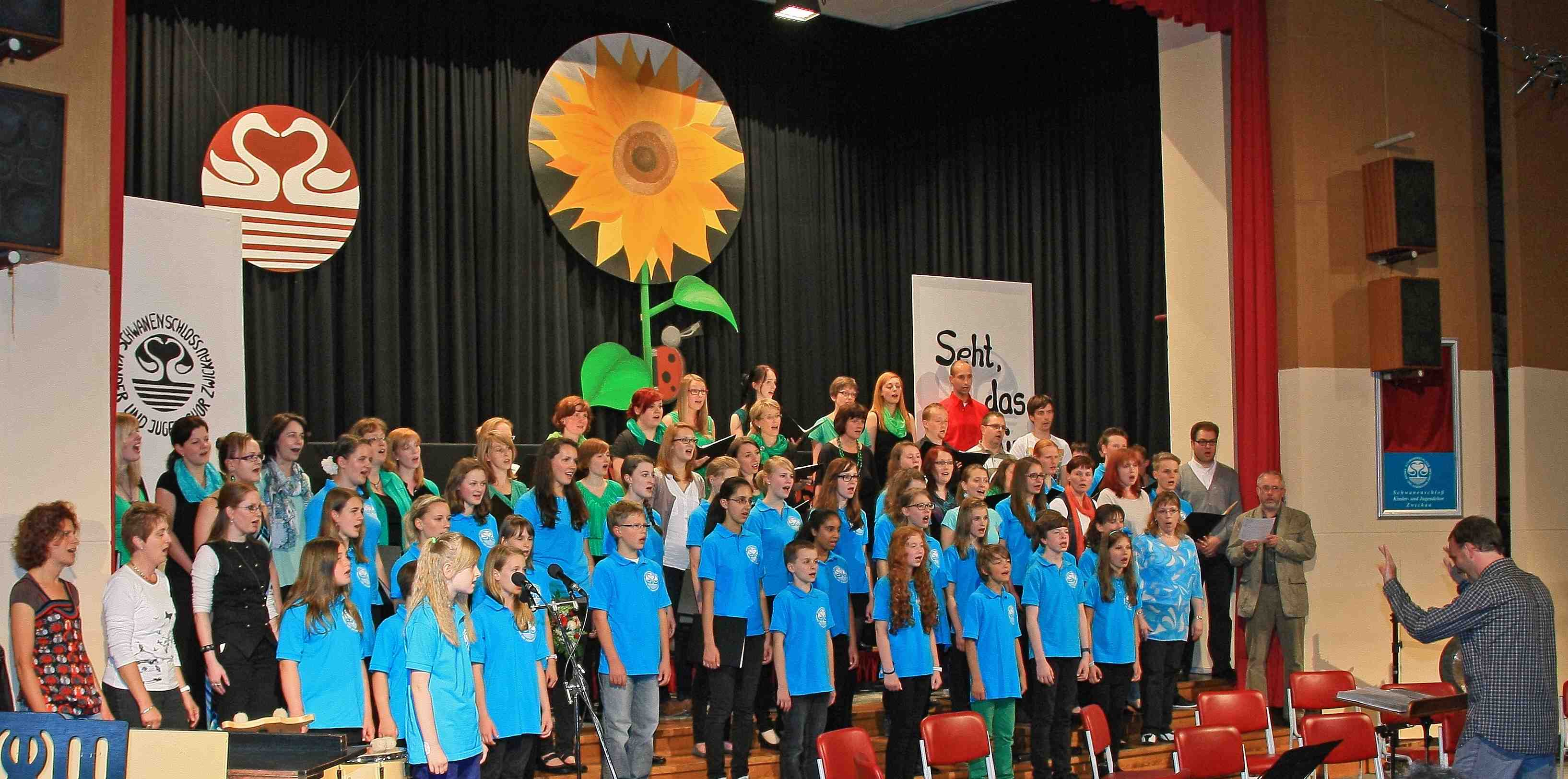 Aufnahme vom Sommerkonzert "Seht, das sind wir!" am 29.06.2013 im Zwickauer Freizeitzentrum Marienthal.